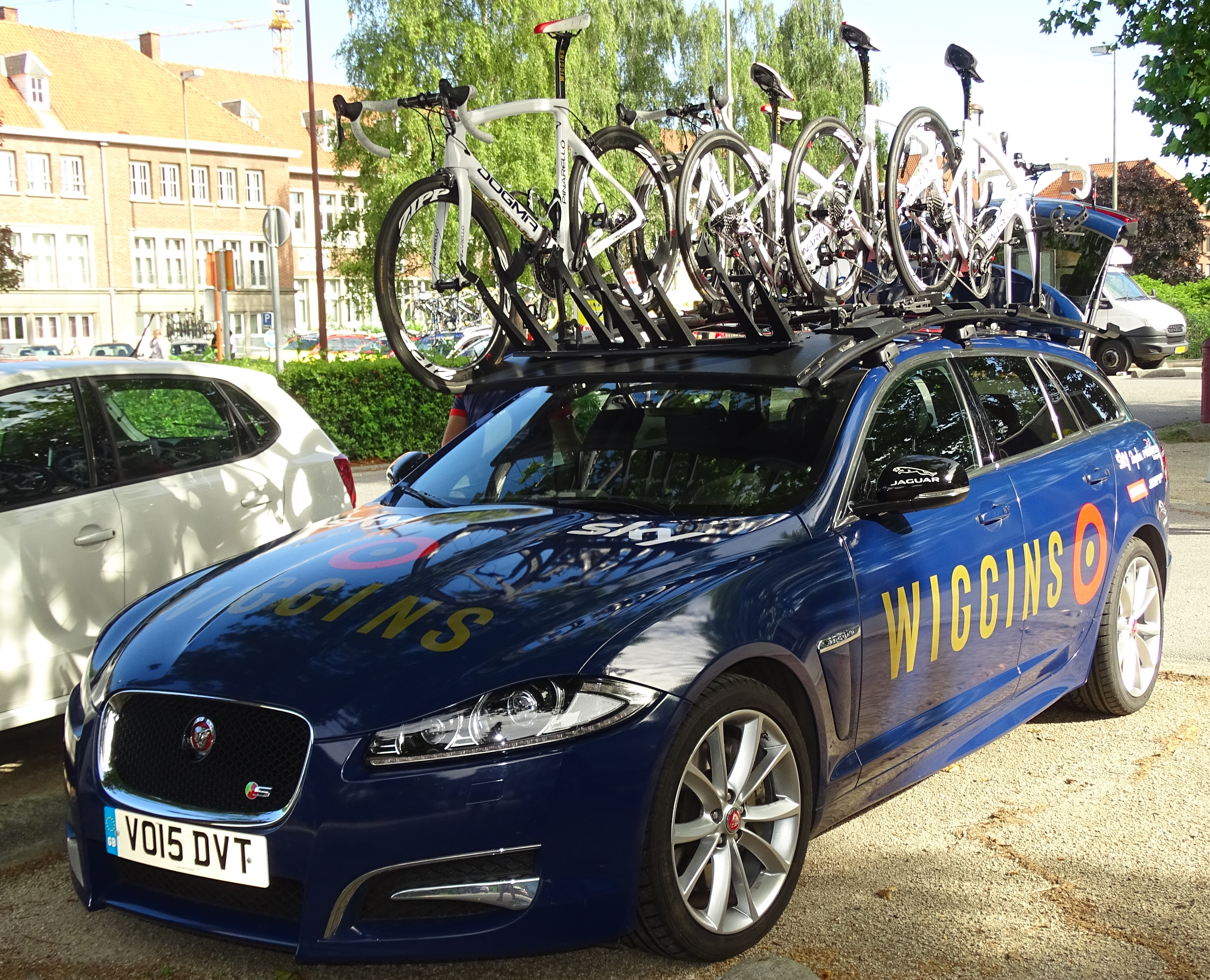 Reportage réalisé le mercredi 22 juillet à l'occasion du départ du Grand Prix Pino Cerami 2015 à Saint-Ghislain, Belgique.